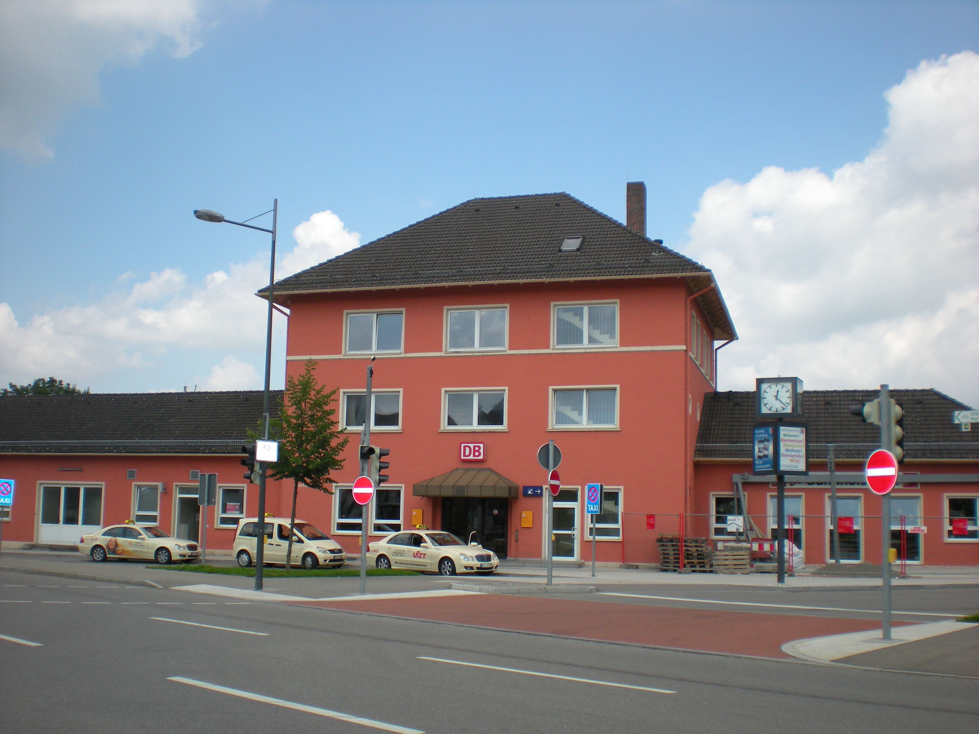 Bahnhofsgebäude Günzburg Straßenansicht